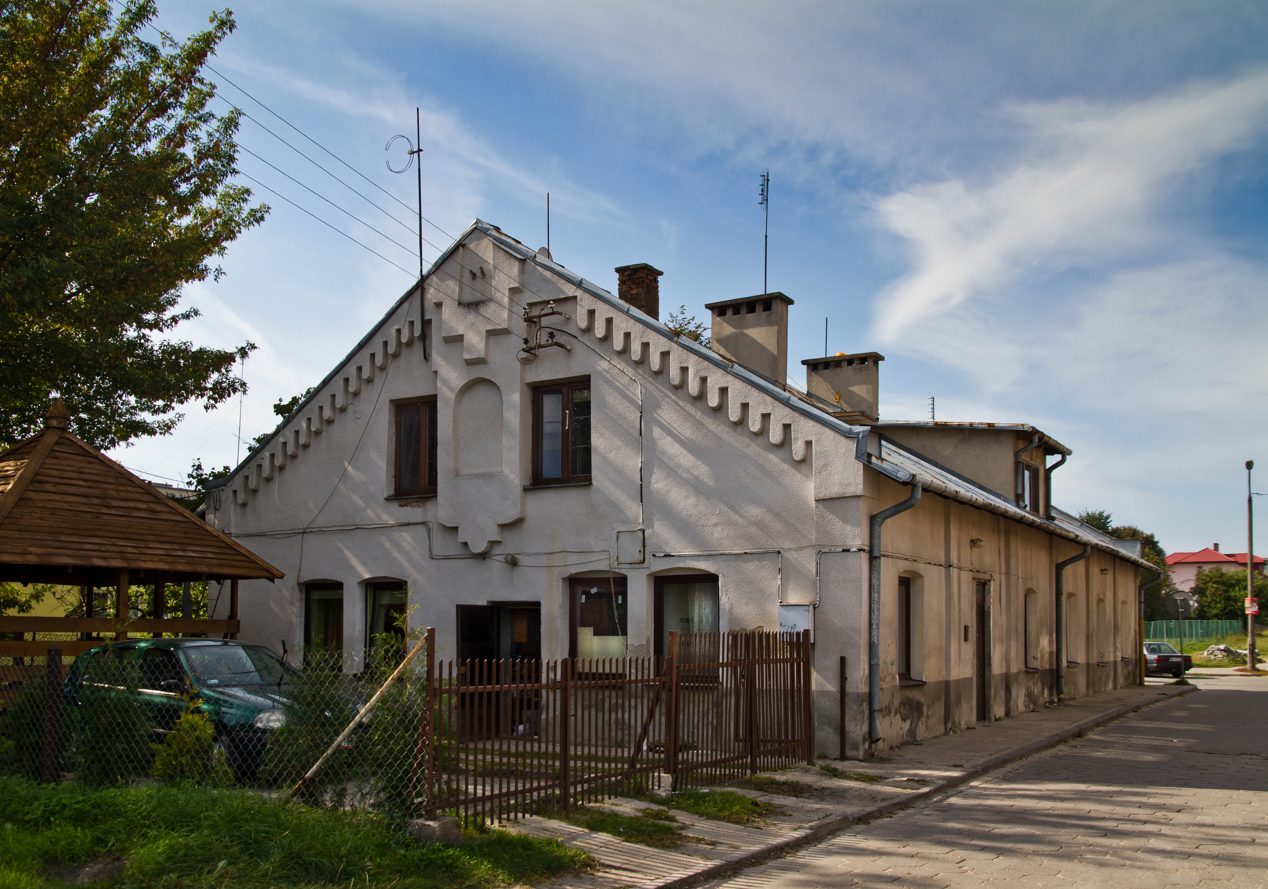 Maków Mazowiecki, ul. Przasnyska 19, łaźnia żydowska, pocz. XX